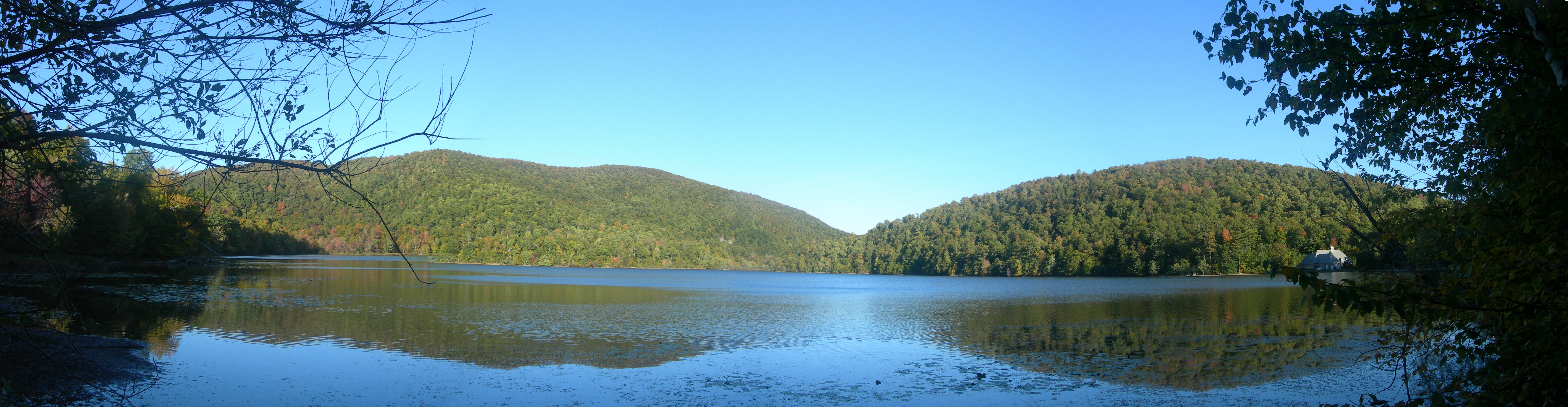 Lac Hertel, Mont St-Hilaire, Québec, Canada